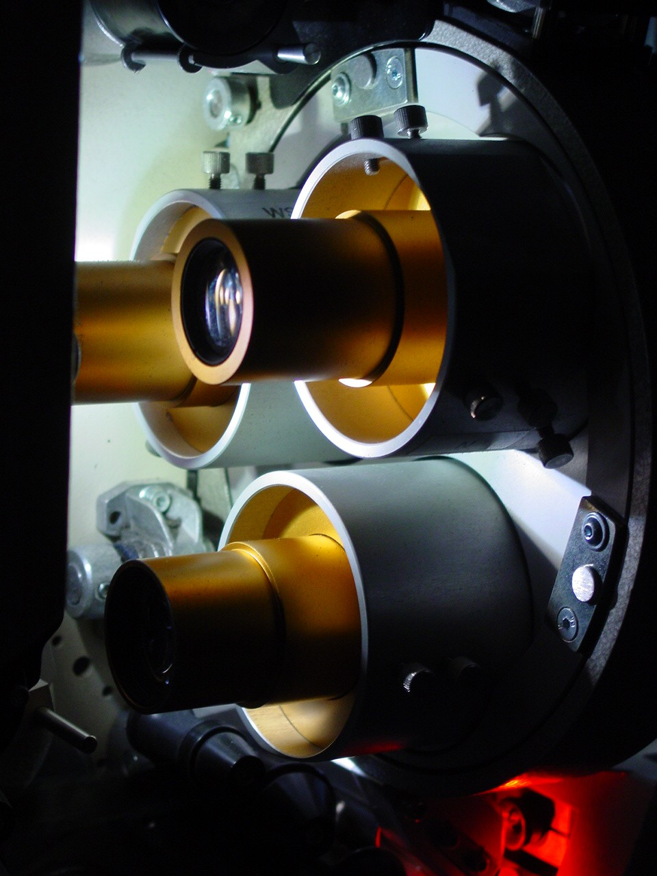 Objektivrevolver